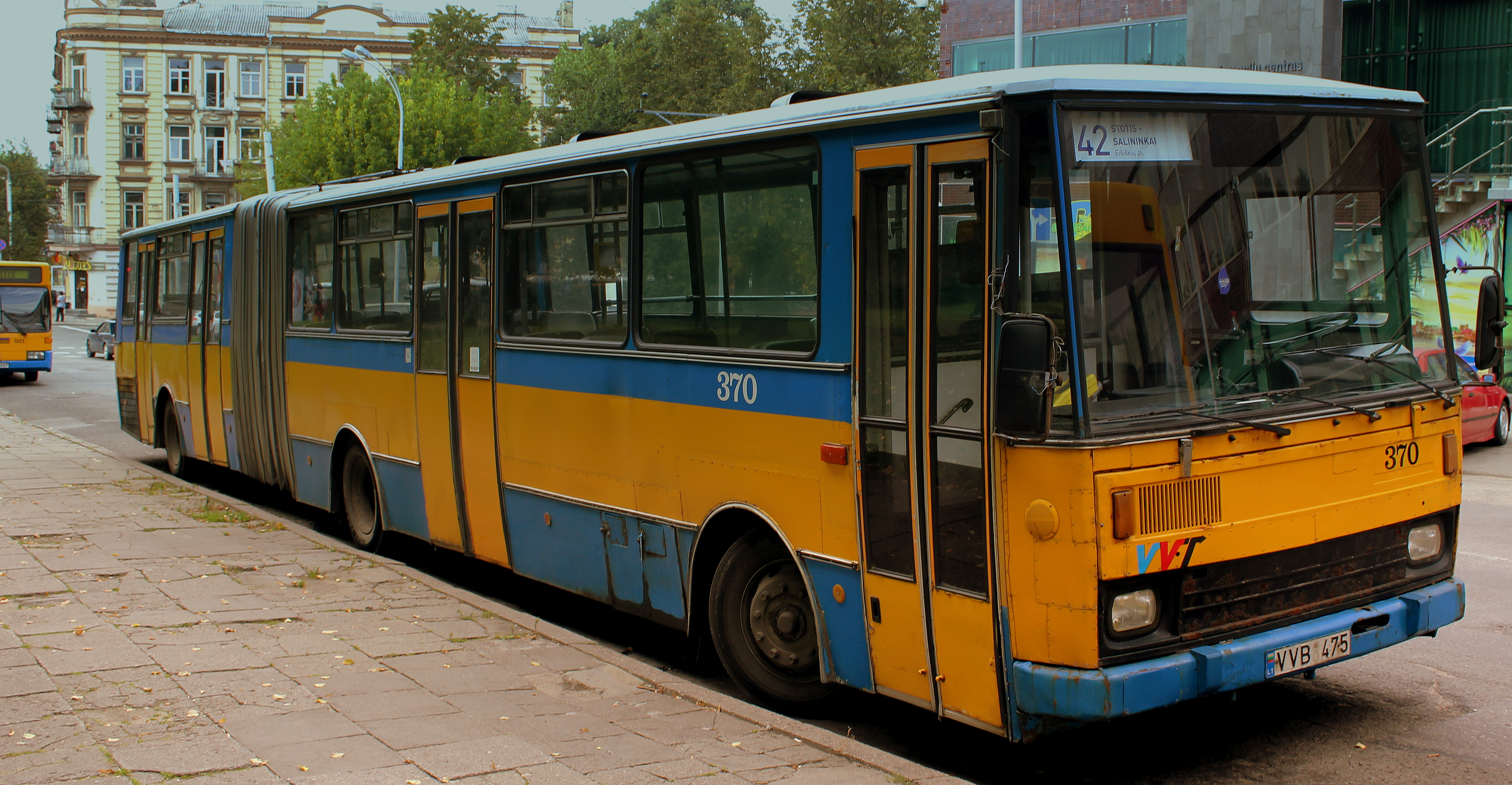 VILLINUS VVT BENDI BUS LITHUANIA SEP 2013